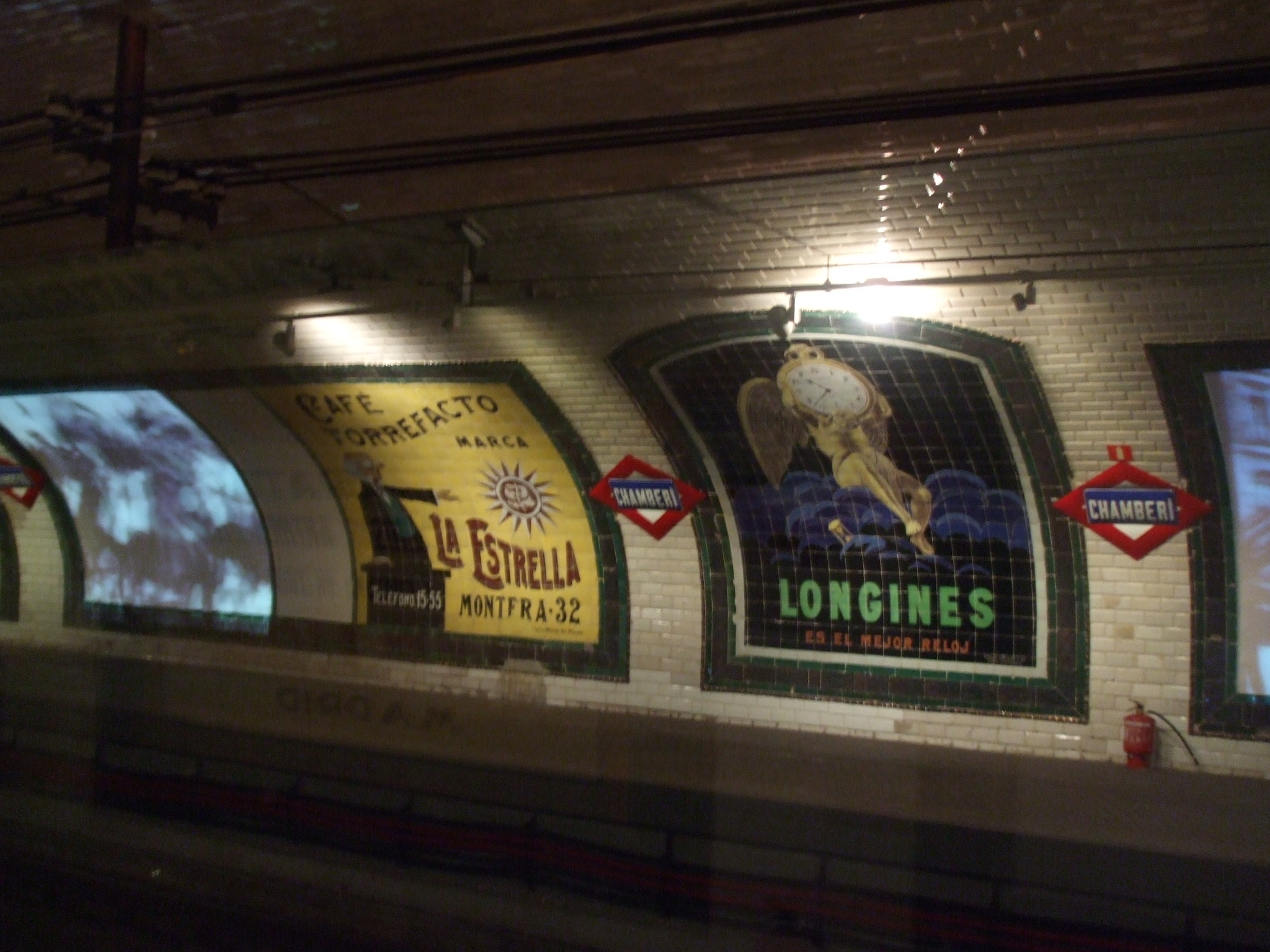 Estación de Chamberí Anuncios en azulejos